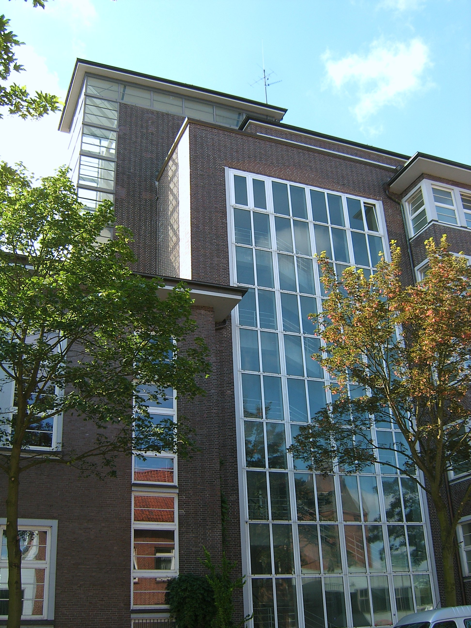 Die ehemalige Volksschule Wendenstraße wurde von 1929 bis 1930 nach Plänen von Fritz Schumacher errichtet. Sie beherbergt jetzt die Staatliche Handelsschule H 9.This is a photograph of an architectural monument.